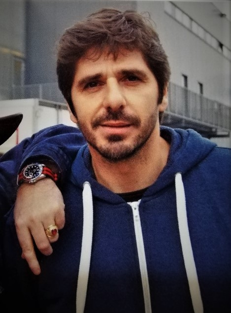 Patrick Fiori soutient tout les ans le télévie Belgique, ici en 2014